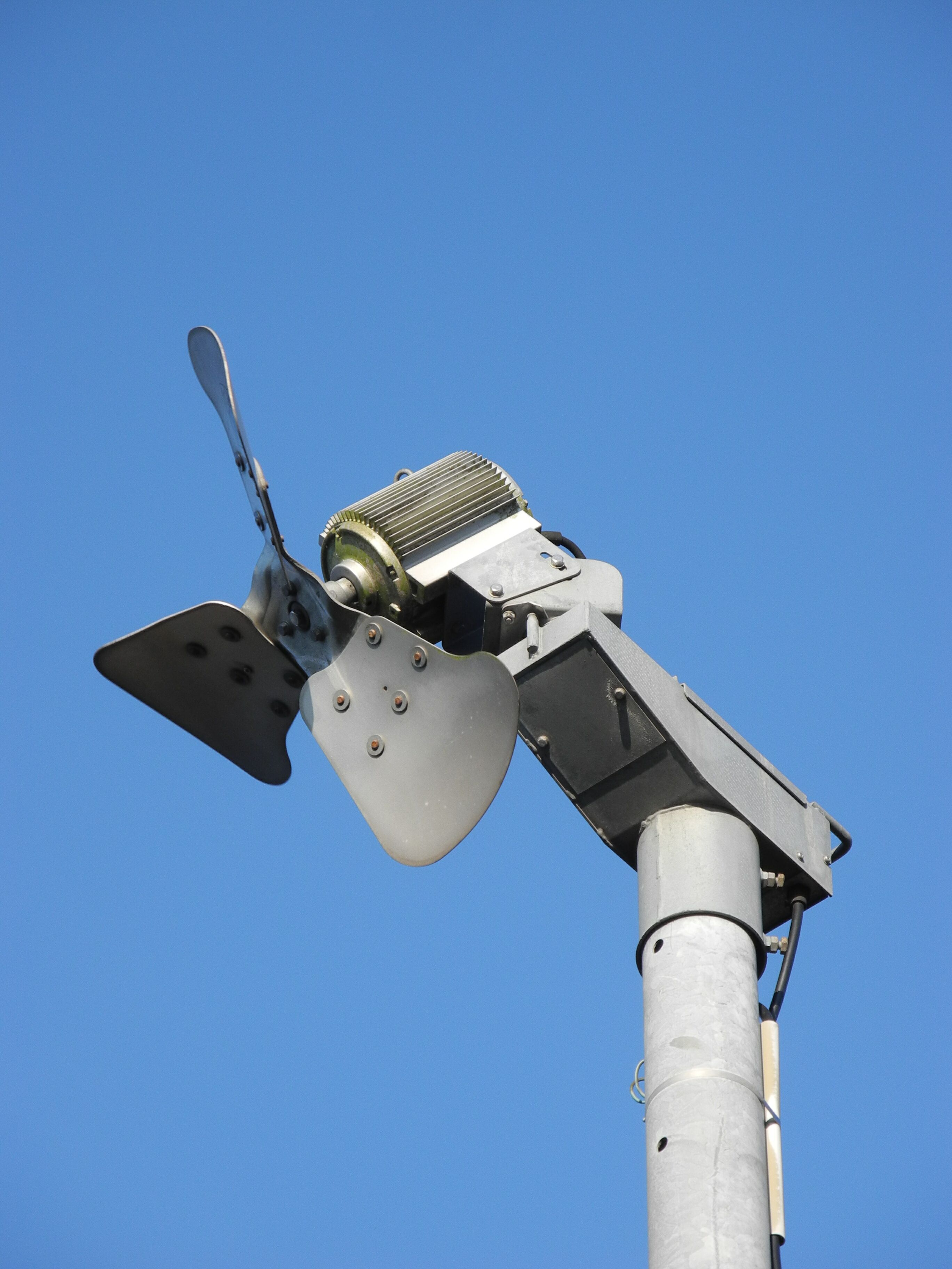 防霜ファン - 香川県三豊市